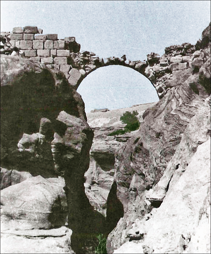 Le pont aqueduc voûté de Shub Qaïs encore visible en 1980.